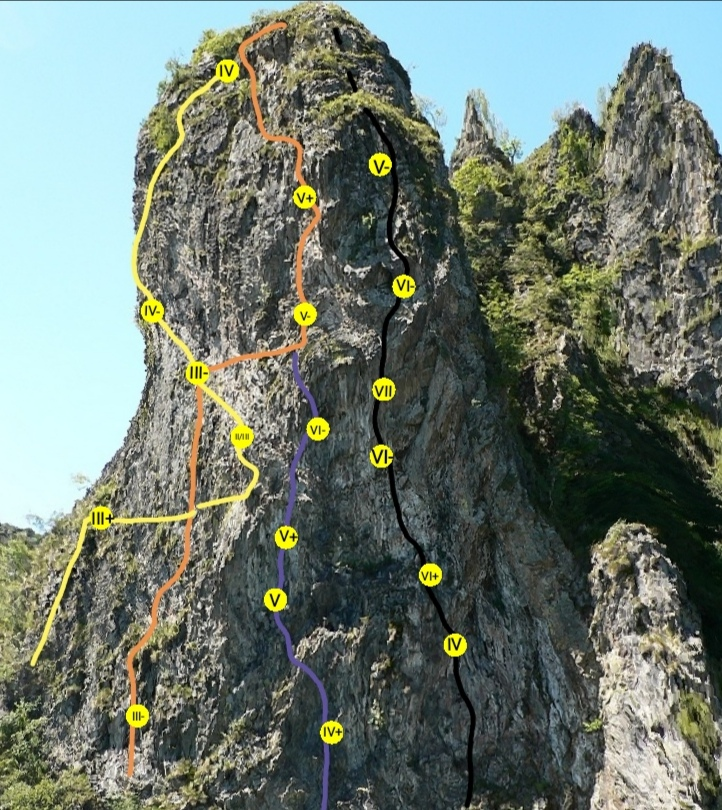 Vie di roccia sulla Mognetta Storta, nei Denti di Gavala.